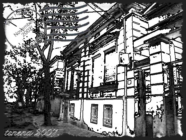 Stari Požarevac